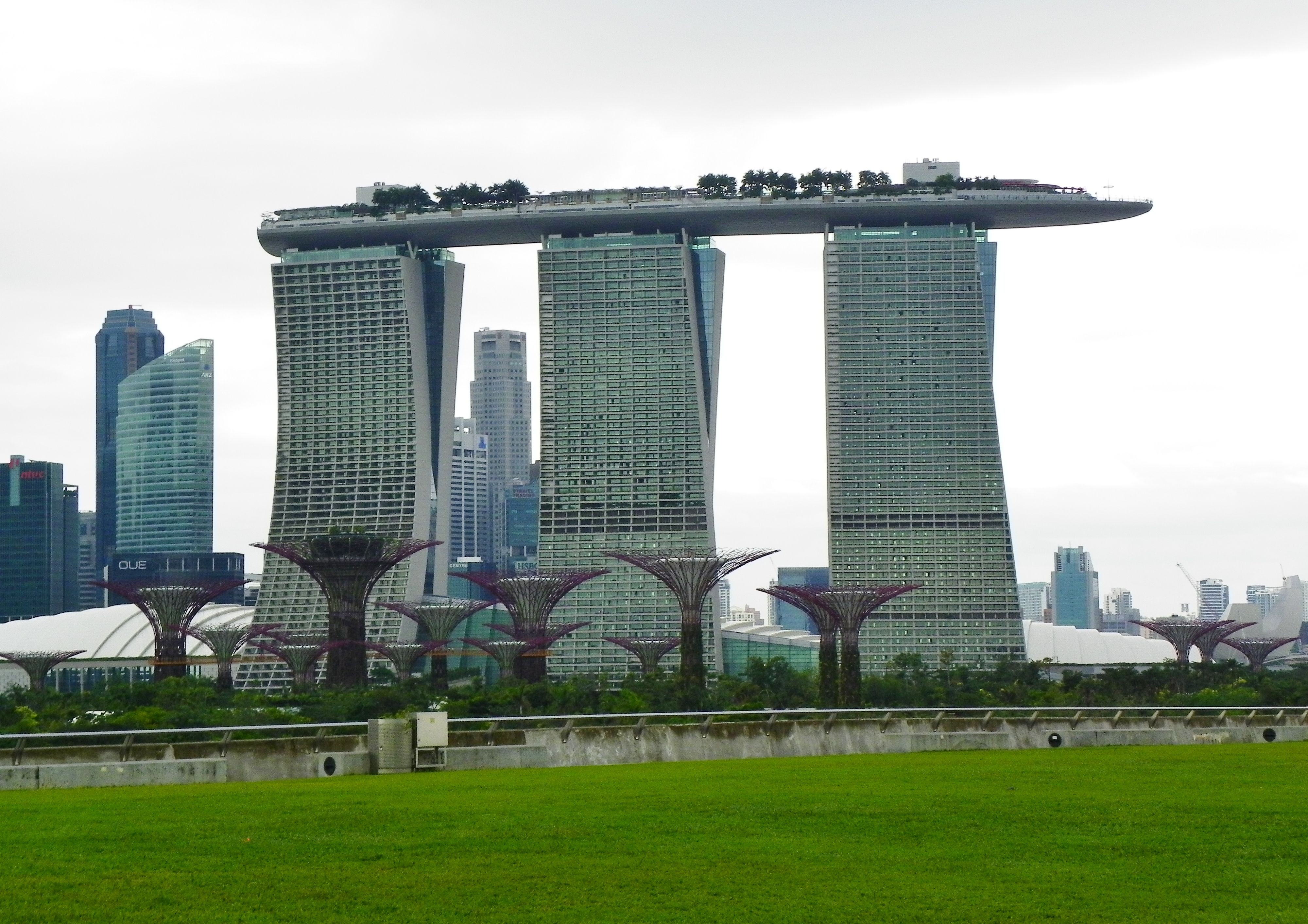 從濱海堤壩遠望濱海灣花園與金沙飯店。